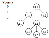 Граф структуры системы (И-дерево)